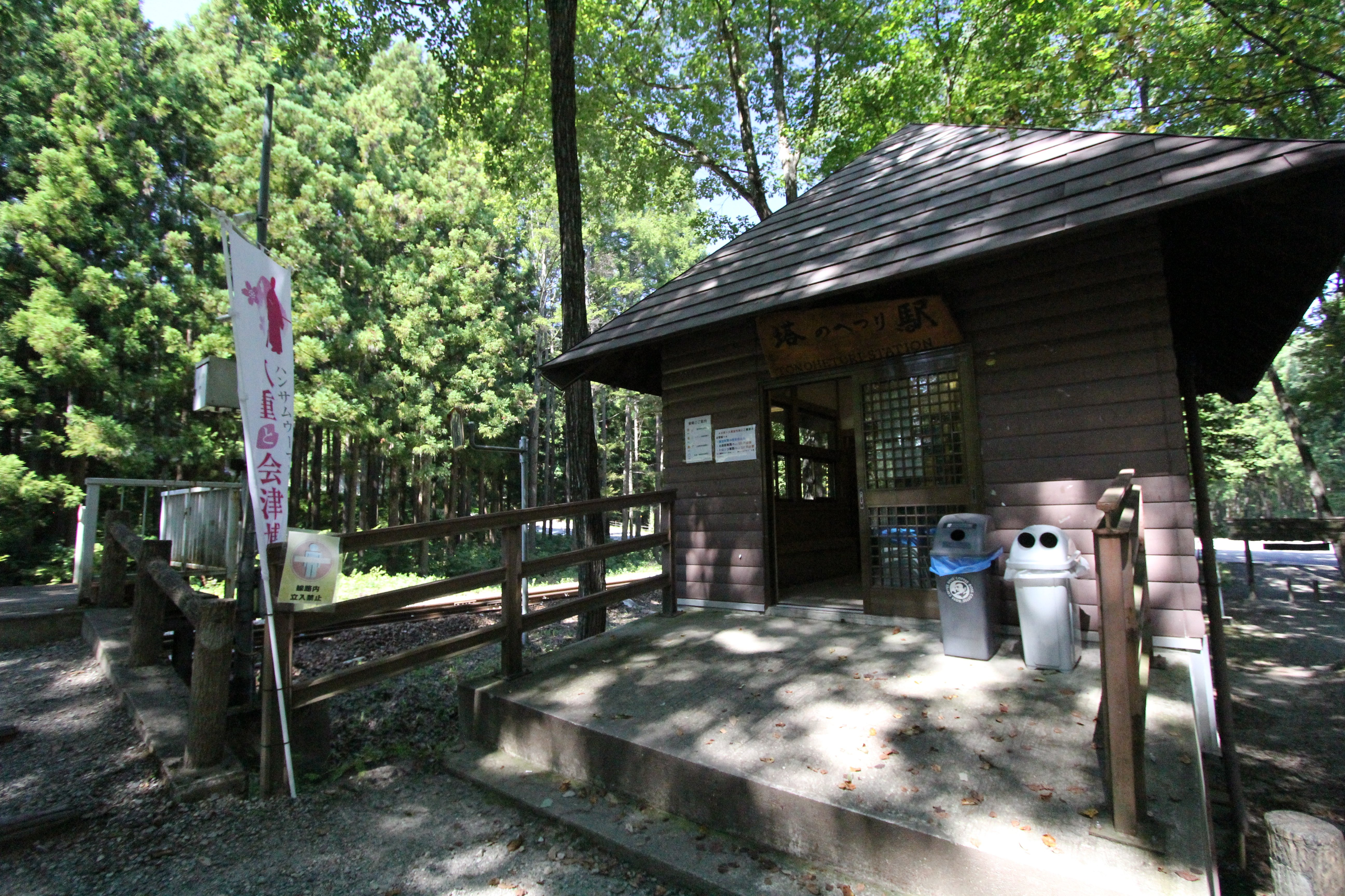 塔のへつり駅